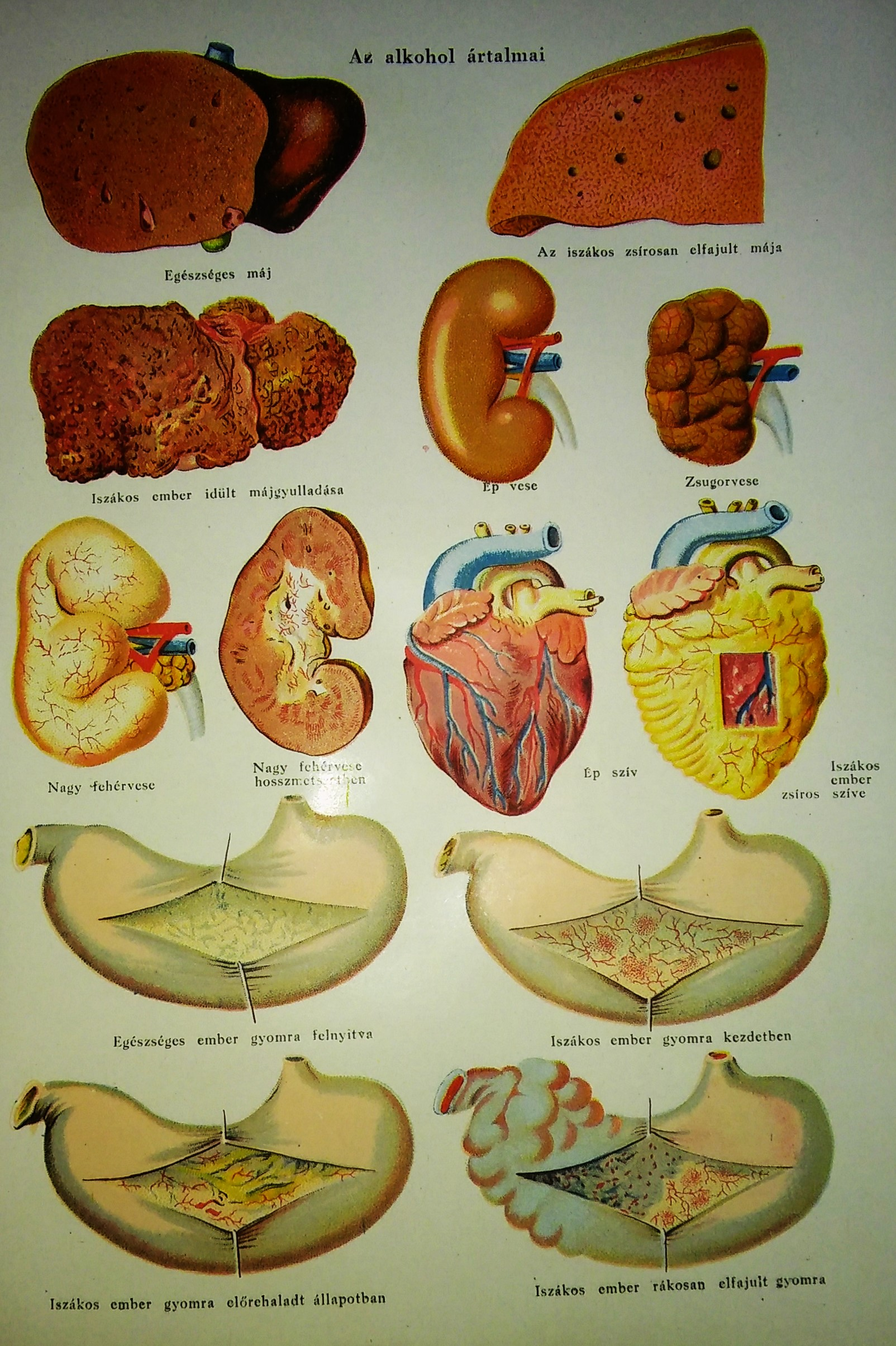 Illusztráció A család egészsége című műhöz, készítő nem ismert, 1930-as évek